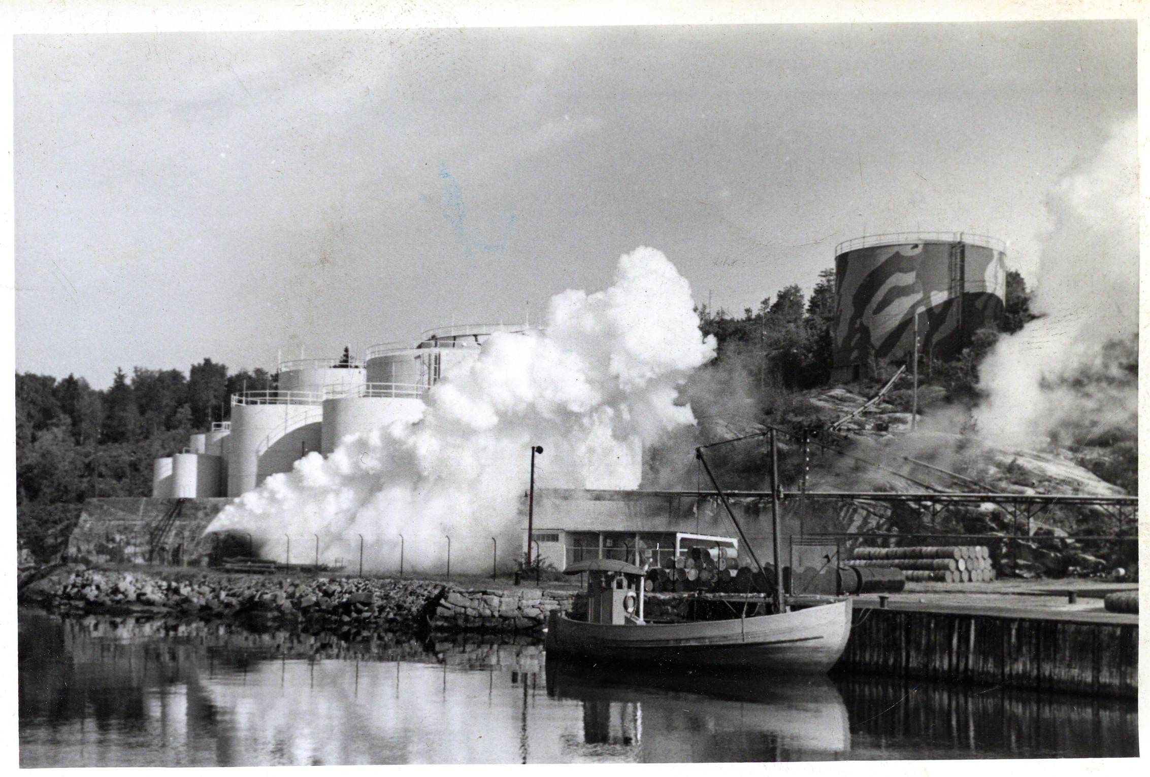 Bildet er hentet fra Arkivverket. Norsk Brændselolje/MIL tankanlegg på Fagerstrand. Før andre verdenskrig. Test av tåkelegging 4. oktober 1939. Arkivinstitusjon : Statsarkivet i Stavanger Arkivnavn : Pa 1761 - Statoil Fuel and Retail Norge AS Sted : Norge, Akershus, Nesodden, Fagerstrand Emneord: Olje, Petroleum, Tankanlegg Avbildet